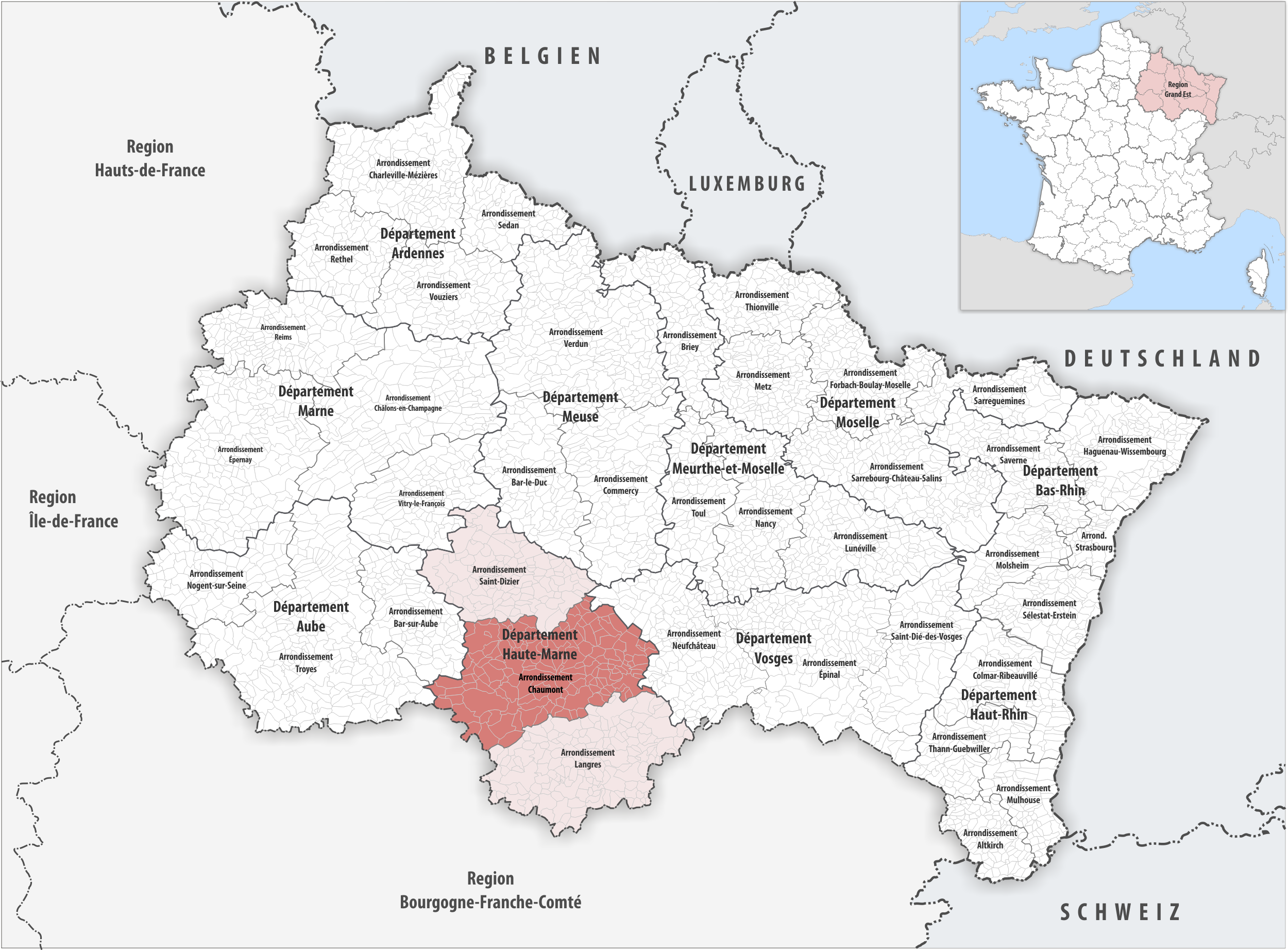 Lage des Arrondissements Chaumont